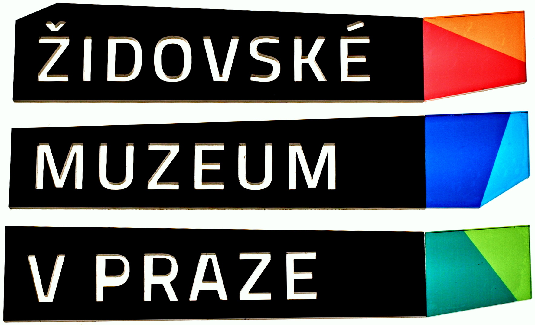 Židovské muzeum Praha